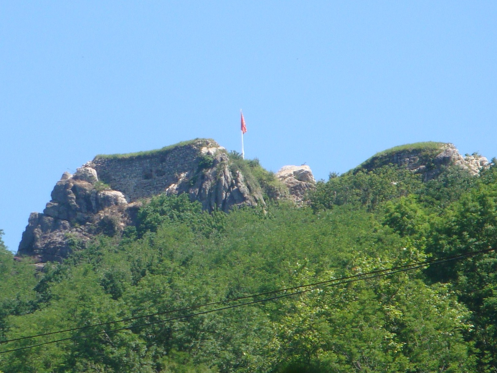 Beloaga gaztelua Arkaleko harkaitzetan.